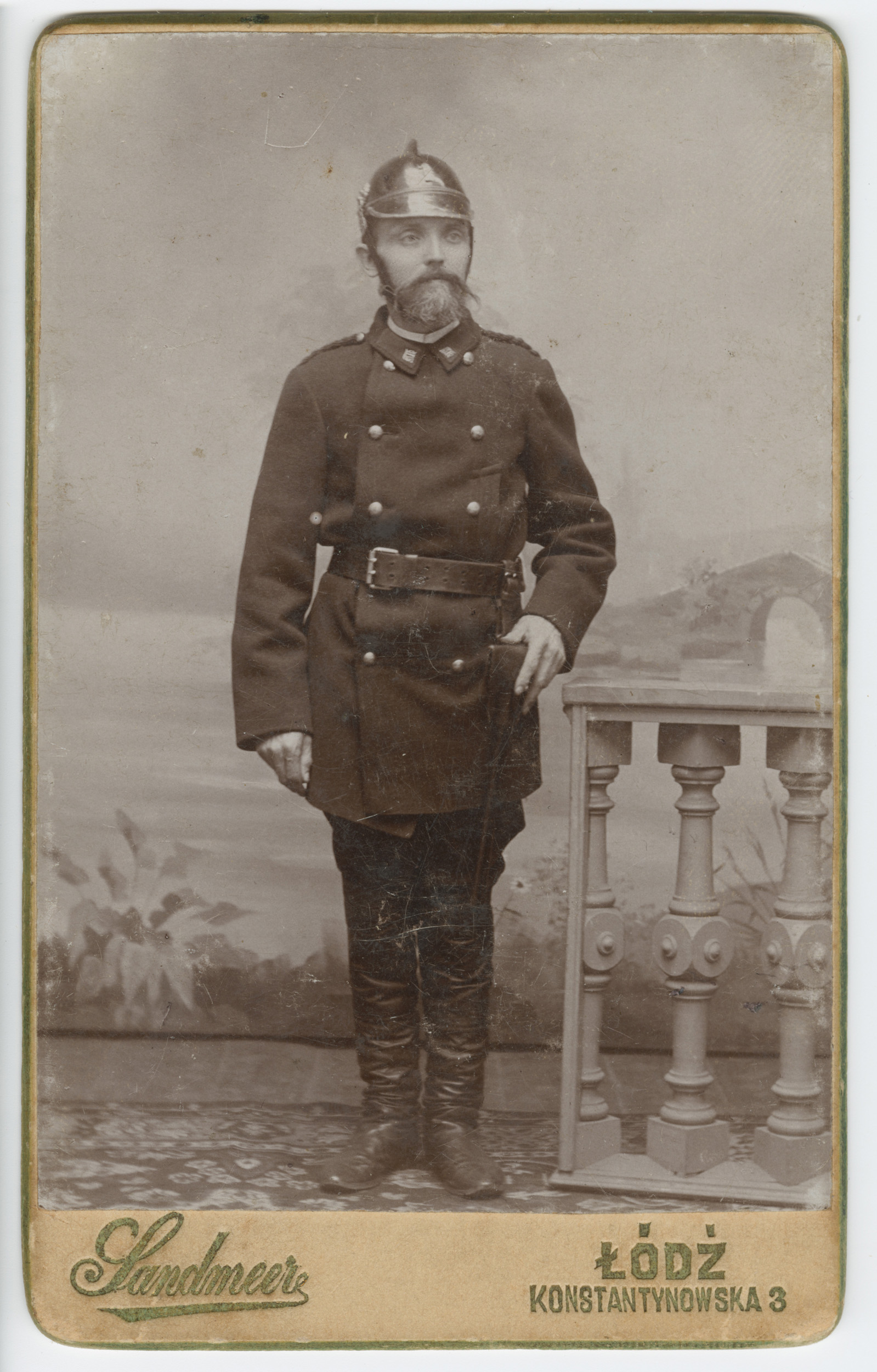 Fotografia portretowa wykonana w atelier zakładu fotograficznego "Sandmeer" przedstawia mężczyznę w średnim wieku w stroju strażaka. Symbolem jego profesji jest toporek strażacki, który trzyma w lewej ręce. Charakterystycznymi elementami stroju są hełm i szeroki pas. Według adnotacji na rewersie jest to Władysław Duszyński. Mężczyzna stoi przy balustradzie, za nim widoczne jest tło przedstawiające pejzaż z rzeką i mostem. Jaków (Jakub) Sandmeer (Zandmeer) był fotografem od 1855 roku. Swój zakład prowadził w Łodzi od chwili otrzymania zezwolenia gubernatora piotrkowskiego w dniu 19 lutego 1890 roku. Przy Konstantynowskiej 3 (obecnie ulica Legionów) w 1890 roku powstał parterowy budynek jego zakładu fotograficznego. Został wzniesiony według planów architekta Gustawa Landau-Gutentegera na nieruchomości Nusena Bergera. Kolejny właściciel budynku w 1894 roku nadbudował na istniejącym budynku zakładu fotograficznego pierwsze piętro i nowe pomieszczenia dla atelier (według planów architekta Franciszka Chełmińskiego). W maju 1895 roku prasa opisywała pokaz wykonanych przez niego fotografii na porcelanie, które oglądane w sztucznym świetle sprawiały wrażenie barwnych. Dnia 25 września 1896 roku uzyskał ważne przez rok zezwolenie na wykonywanie fotografii na terenie guberni piotrkowskiej. O podobne, obejmujące gubernię radomską starał się bez powodzenia około 1901 roku. Prawdopodobnie wcześniej wykonywał na jej terenie zdjęcia bez pozwolenia, ponieważ w podaniu pisał, że "jego usługi znalazły uznanie wśród miejscowej ludności". Zakład zlikwidowany został po 1920 roku.